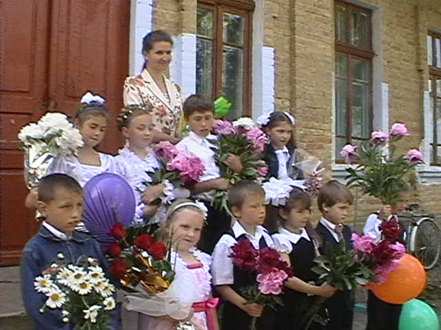 Косівська загальноосвітня школа I ступеня: Останній день навчання 2010 р.